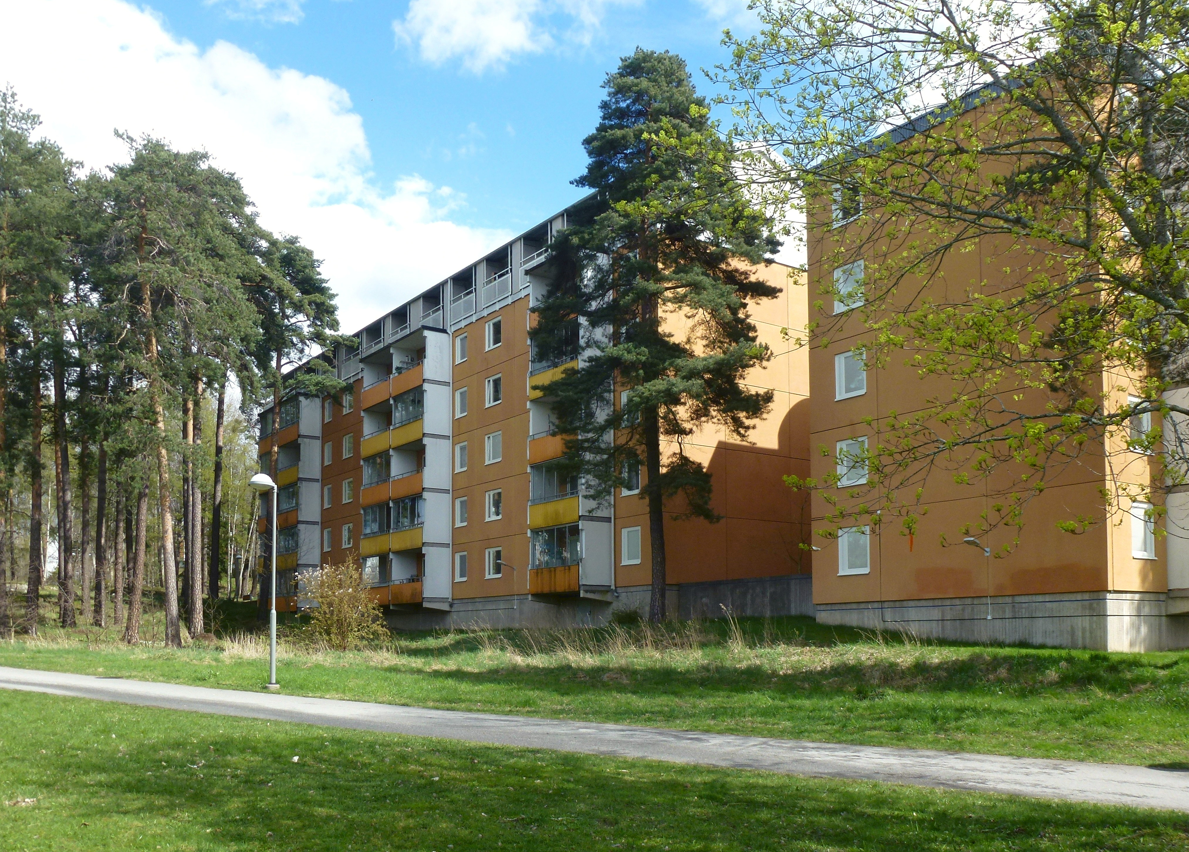 1970-tals bebyggelse i Husby, Stockholm